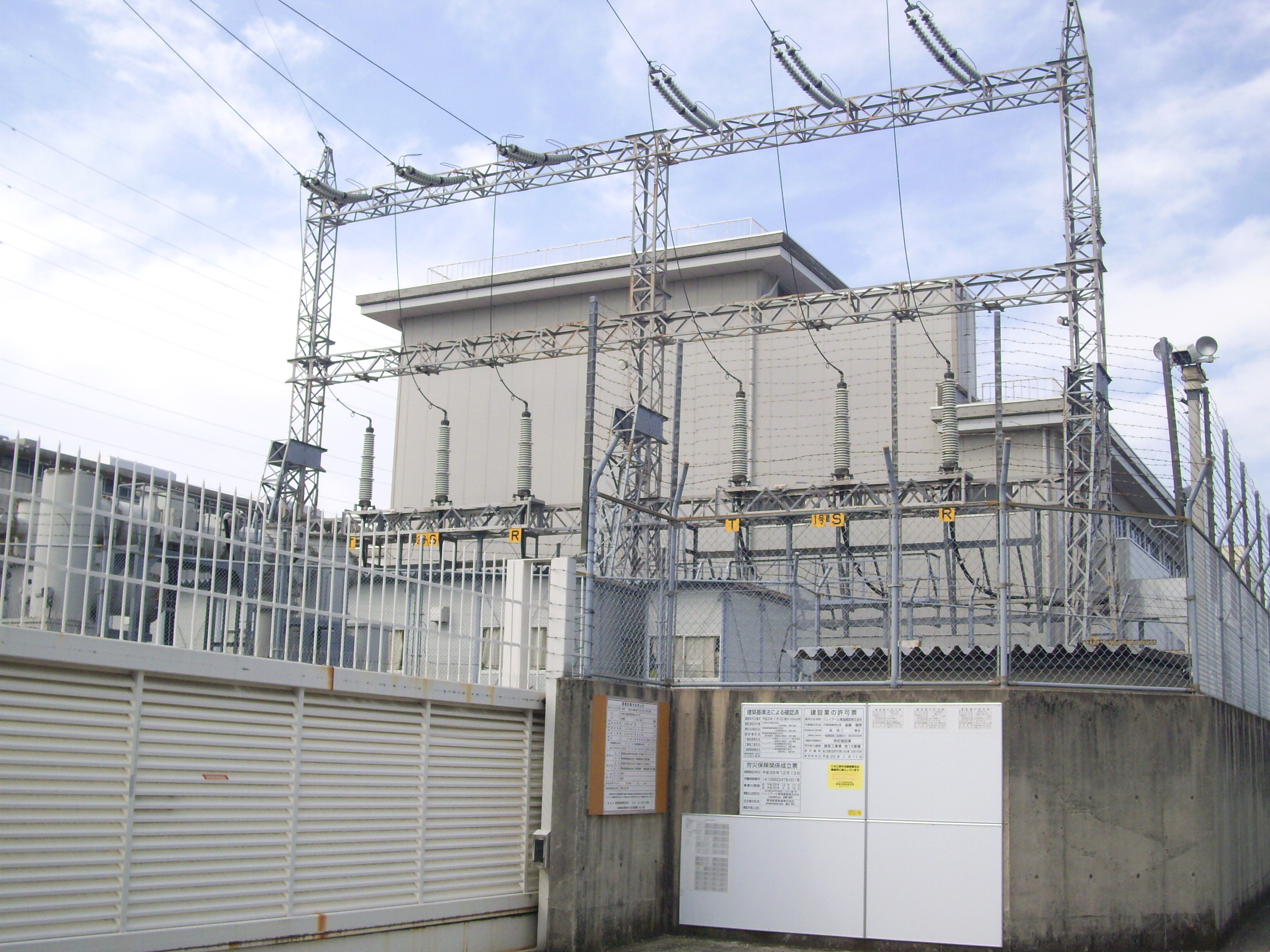 東海道新幹線の電圧を50Hz→60Hzにするための周波数変換変電所（横浜市港北区綱島） ㊟カメラを起動すると日付機能が出荷時のものに初期化されるため、ファイル履歴の撮影日時とメタデータの原画像データの生成日時が異なります